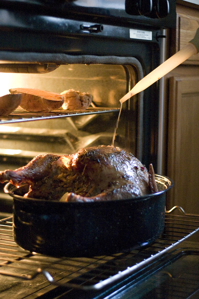 Basting...